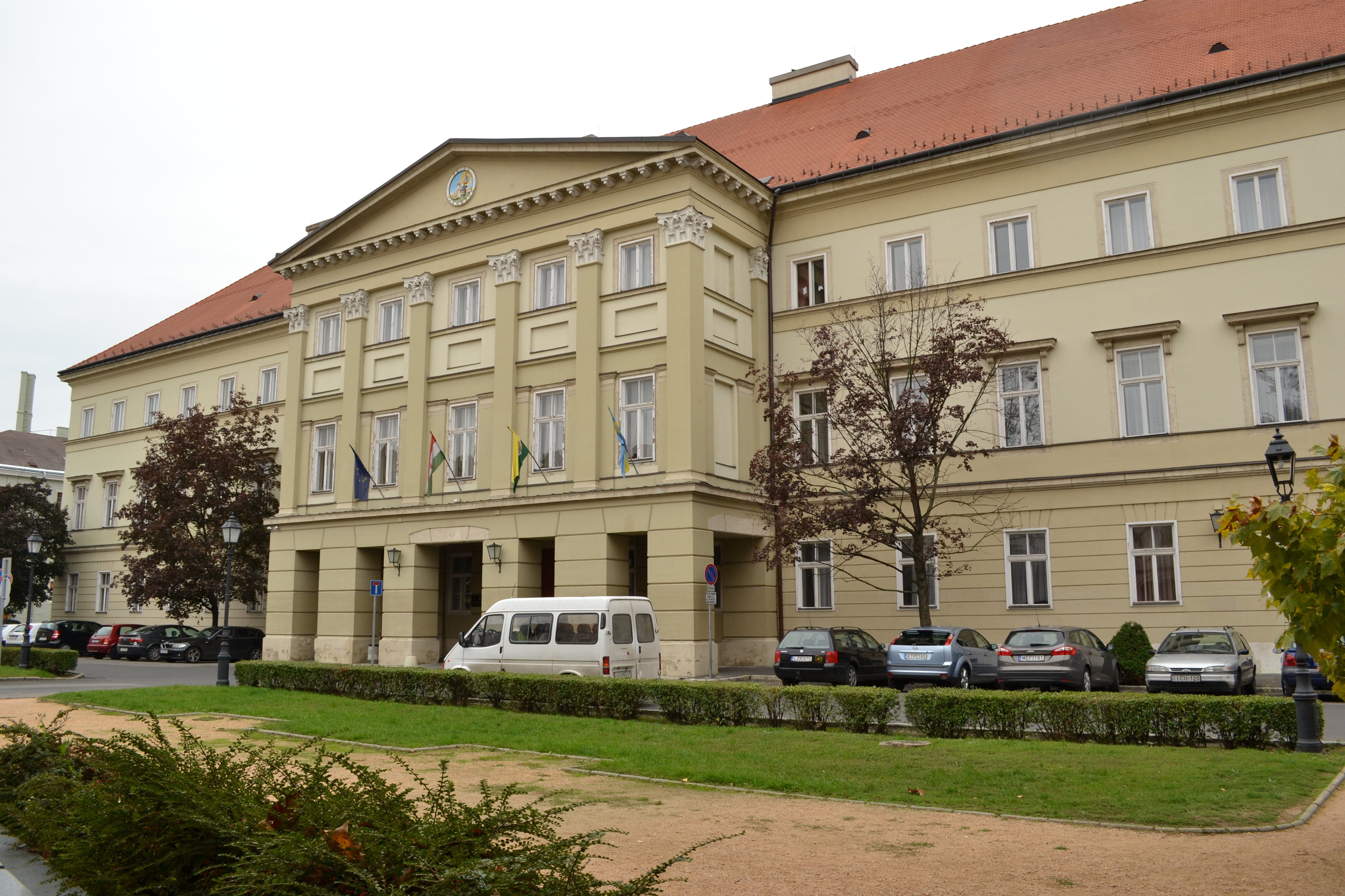 megyeháza This is a photo of a monument in Hungary. Identifier: 3901